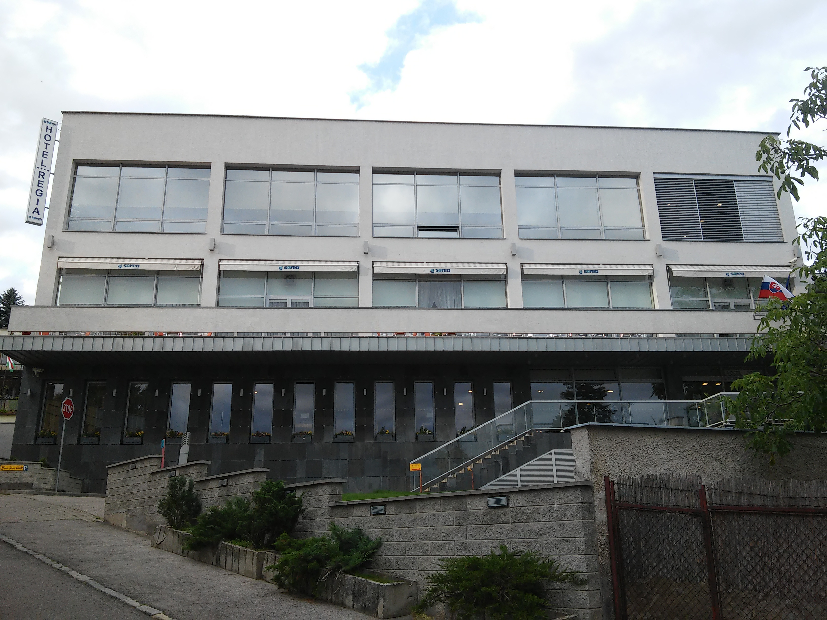 Dom kultúrnej rekreácie, Kráľovské údolie, Staré Mesto, Bratislava